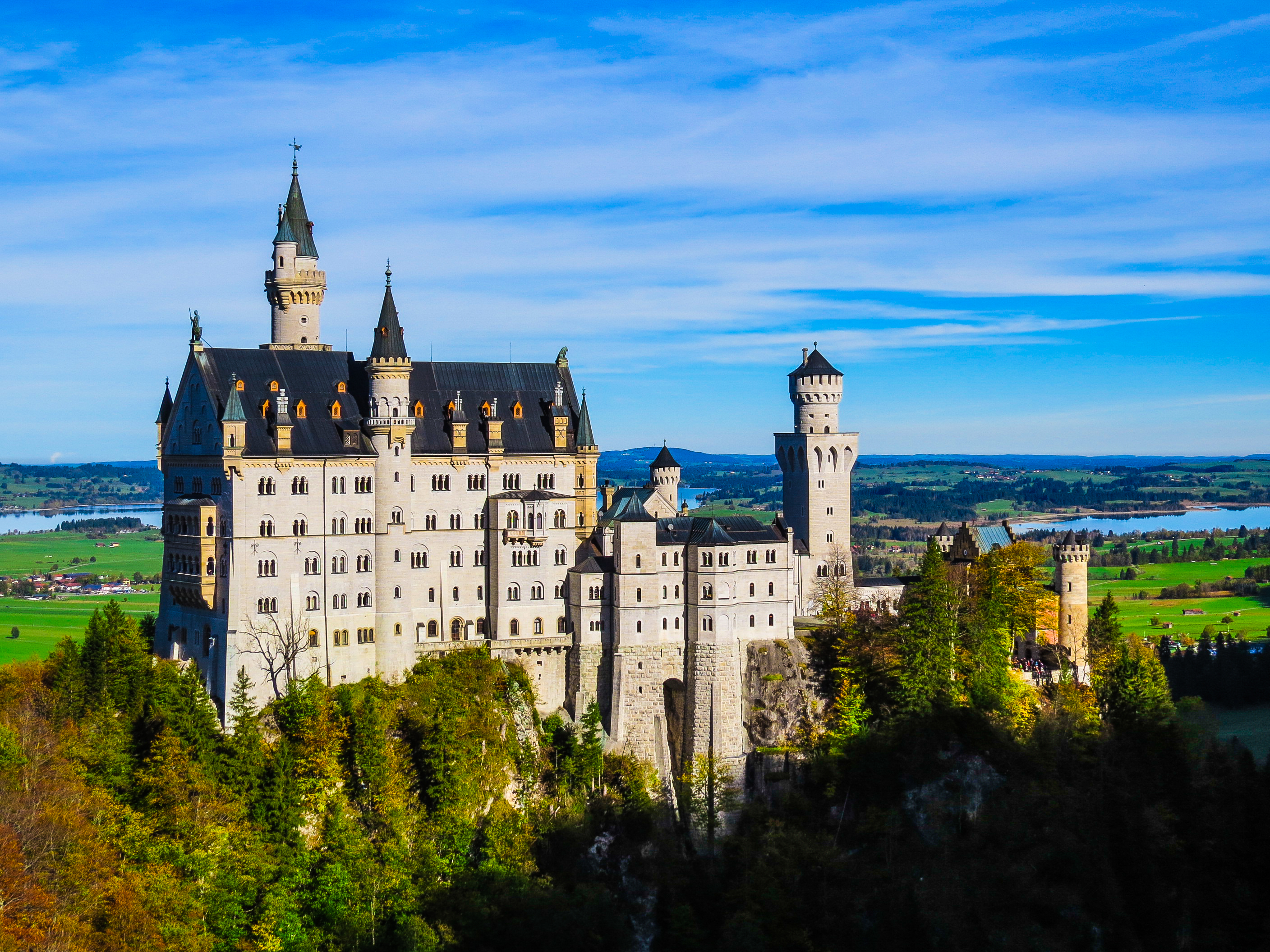 Schloss Neuschwanstein